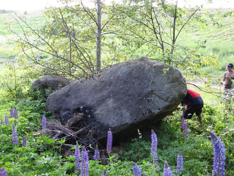 Крыўск. Вялікі крыўскі камень